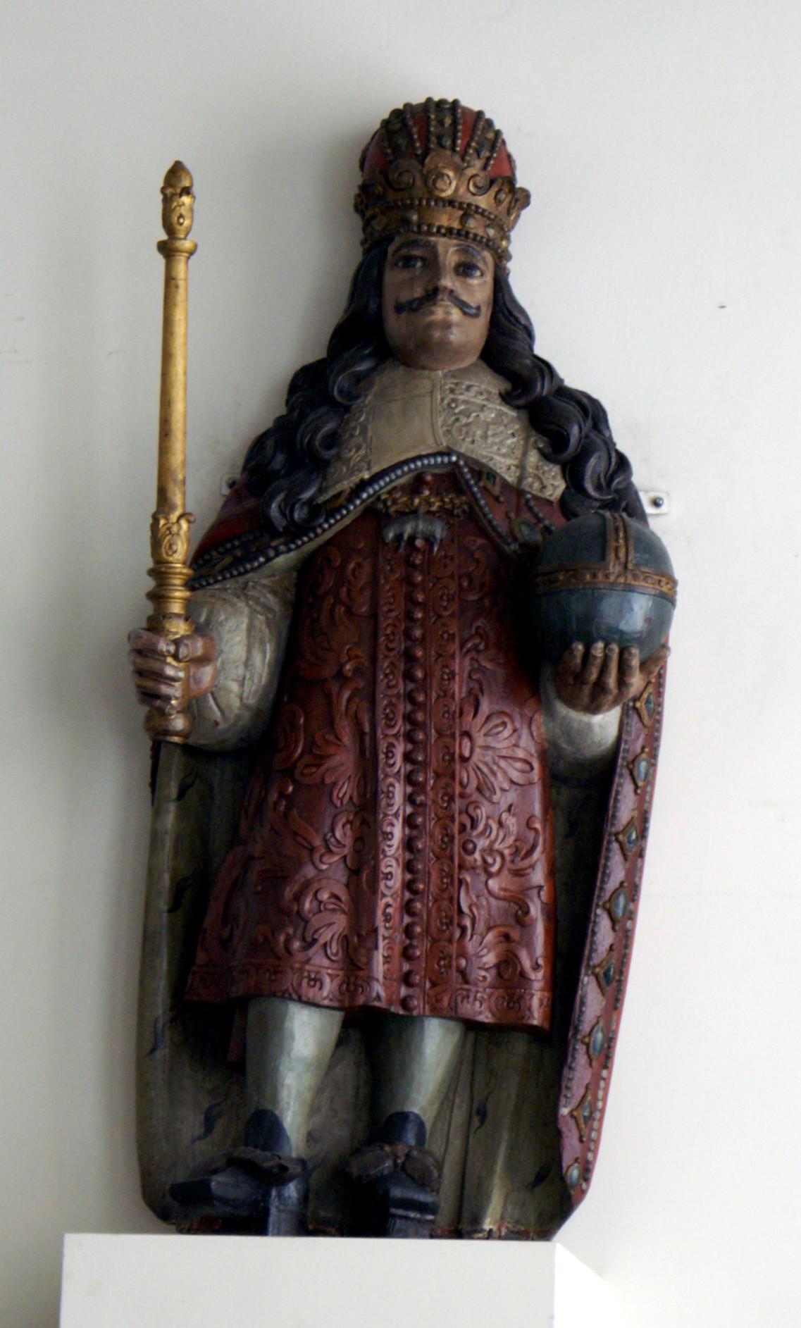 Heckfigur des hamburgischen Konvoischiffes Leopoldus Primus, ausgestellt im Museum für Hamburgische Geschichte